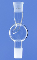 Spatbol